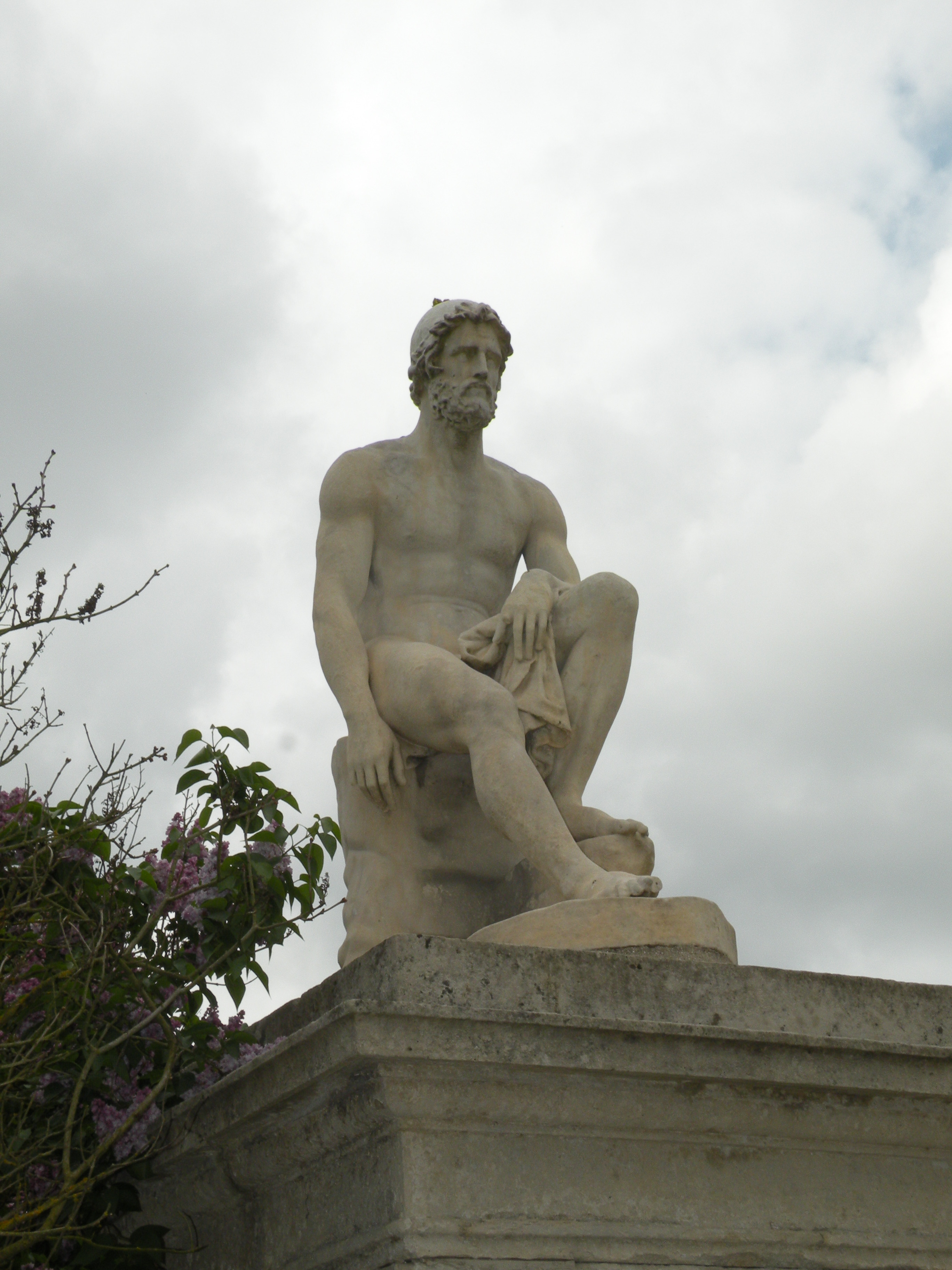 statue d'ulysse en marbre commandé en 1822 à Théophile Bra au château de compiègne